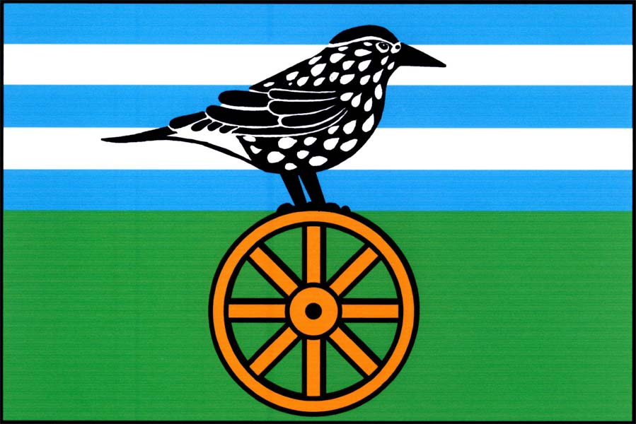 vlajka obce Paseky